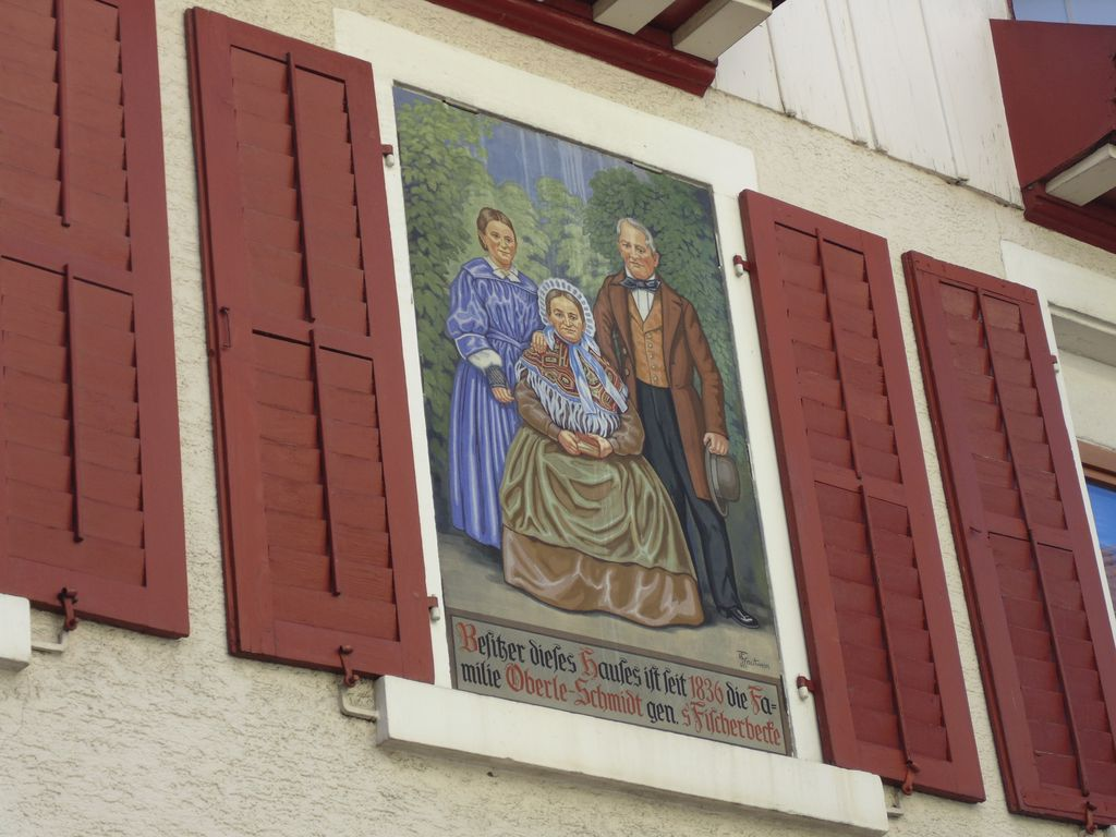 Fassadengemälde von Eduard Trautwein in Wolfach